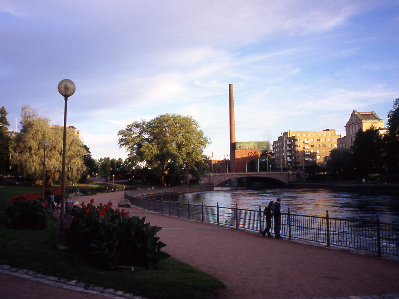 Linkes Ufer des Tammerkoski-Stroms in Tampere, de:2. Juli de:2004, ca. 21:00. Nikolaus Drees, Sundern (Upload genehmigt)